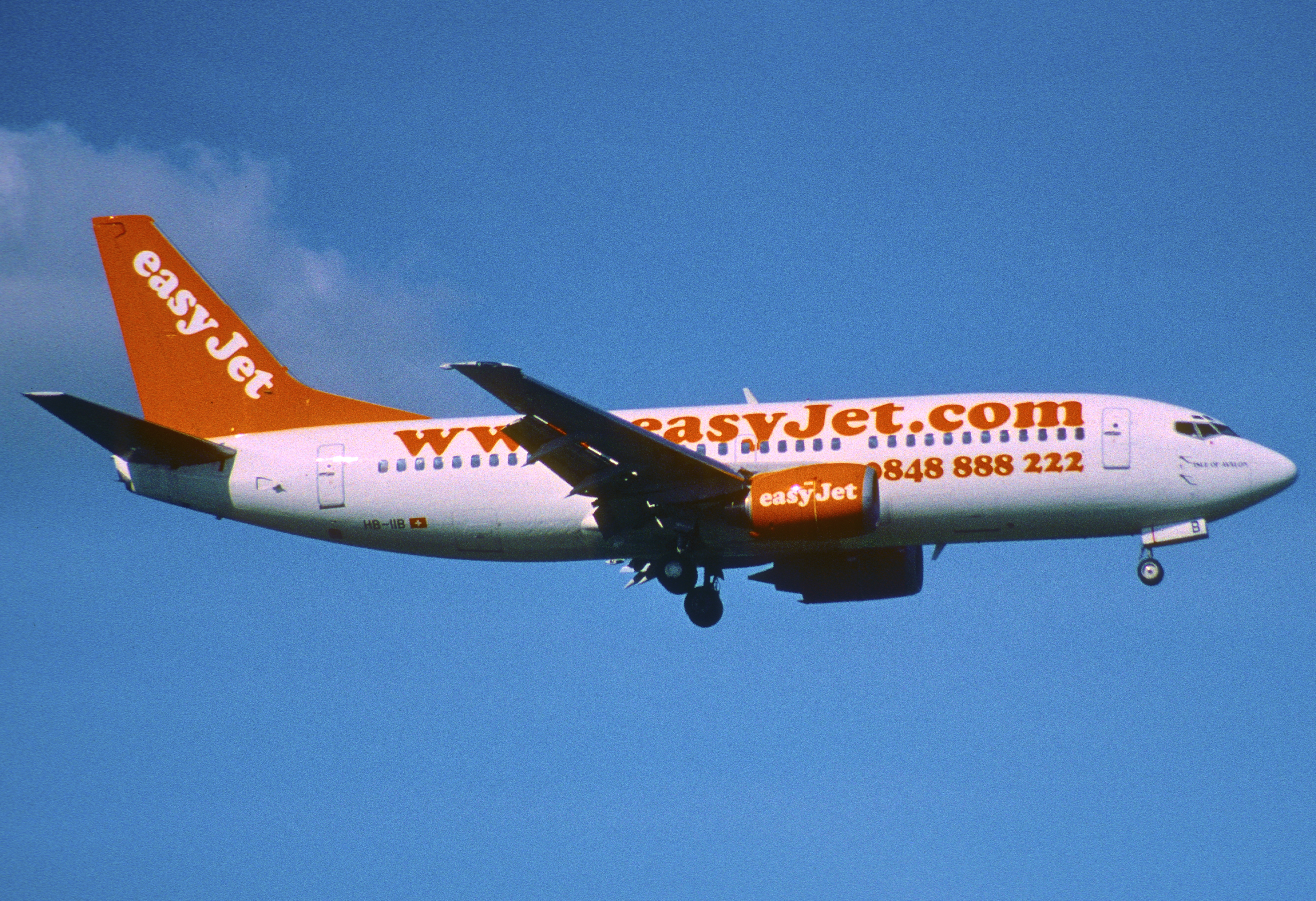 54am - EasyJet Switzerland Boeing 737-300; HB-IIB@ZRH;09.05.1999